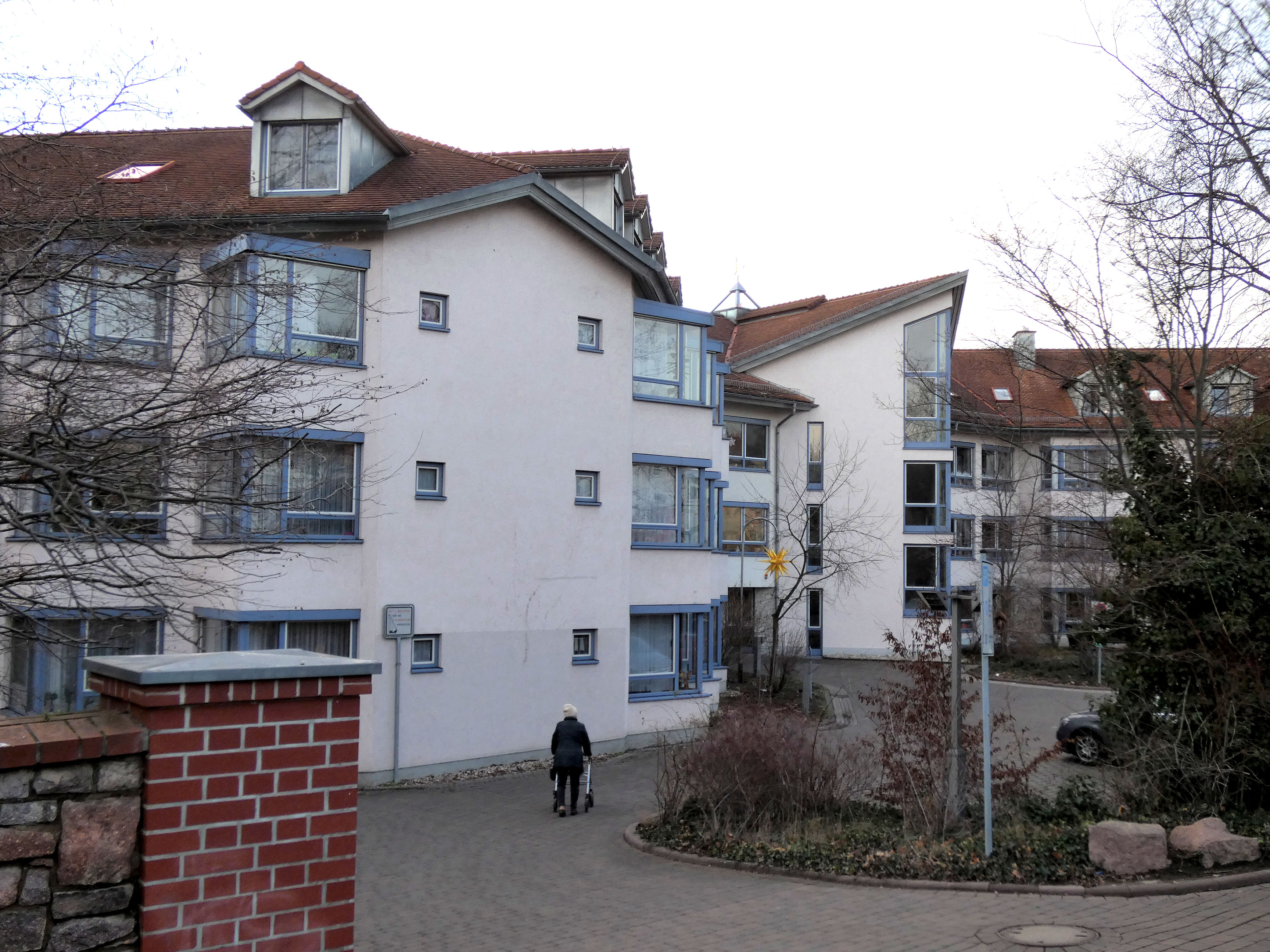 Johannes-Jänicke-Haus, Altenpflegeheim, Diakoniewerk Halle, Burgstraße 45, Halle (Saale)